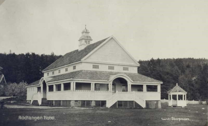 Rødtangen hotell sin restaurant på Rødtangen, Hurum (1915)